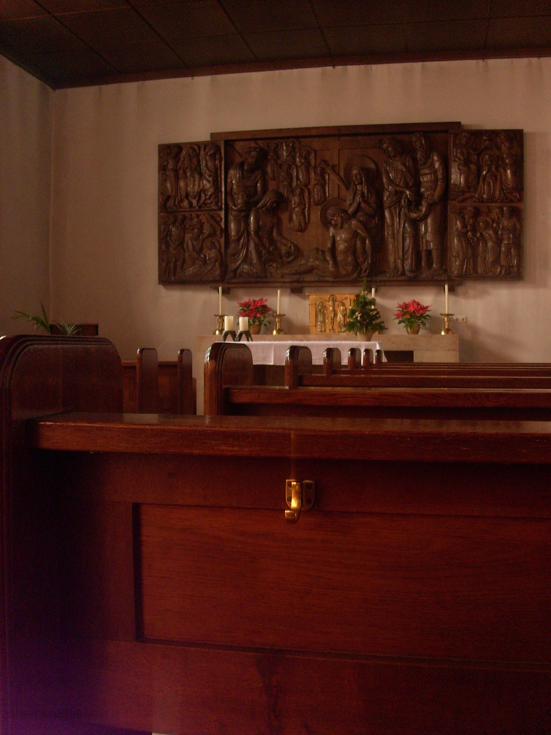 Blick in die Unterkirche der Herz-Jesu-Kirche (Weiden in der Oberpfalz), Deutschland.